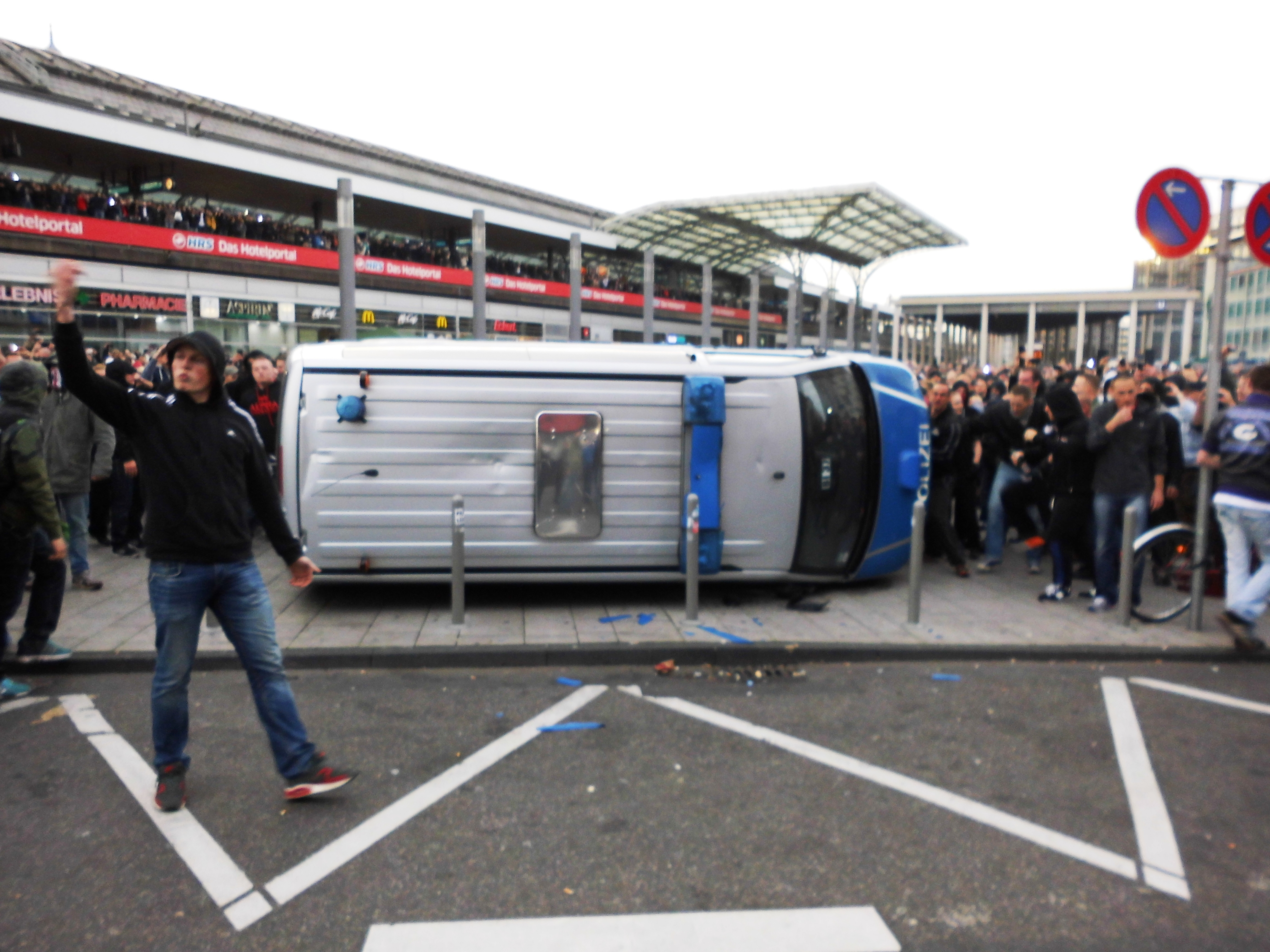 Es ist vollbracht! Später posieren Hooligans für Erinnerungsfotos vor dem umgeworfenen Polizeibulli.